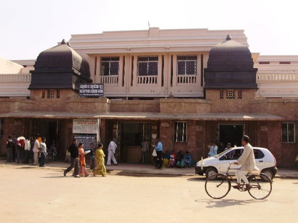 Out patient dept